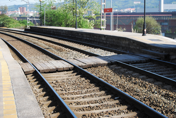 Apeadero de Basauri de Renfe Cercanías - AdifEuskara: Renfe Aldiriak - Adif Basauriko geralekua